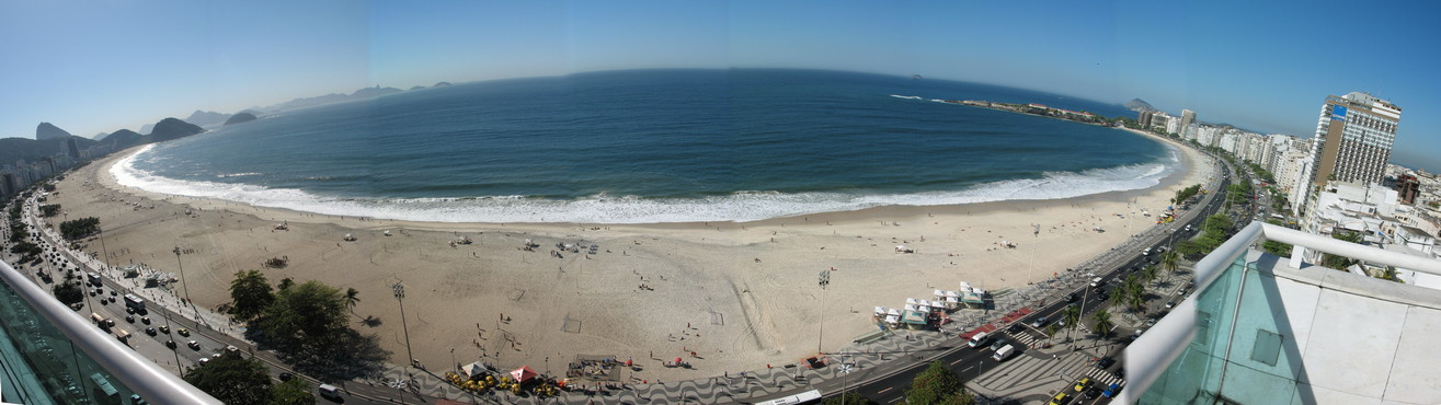 La plage de Copacabana vue du 13e étage de l'hôtel Pestana. Plage de Copacabana vue de la piscine de l'hôtel Pestana.